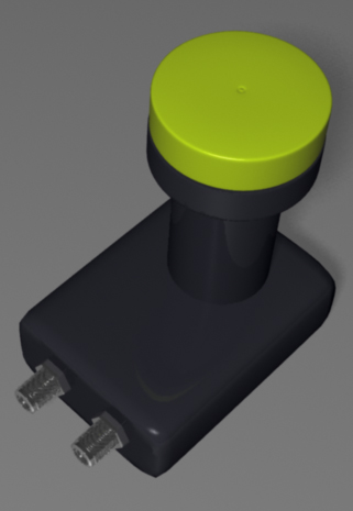 Podwójny TWIN W jednej obudowie umieszczono układ elektroniczny umożliwiający przesył sygnału dla dwóch odbiorników.W uproszczeniu są to dwa konwertery Full Band w jednej obudowie działające niezależnie Pracuje w 2 polaryzacjach i 2 zakresach , wybór następuje poprzez wysterowanie przez odbiornik sat sygnałem(częstotliwości 22kHz i amplitudzie 0,6V) lub jego brakiem . Polaryzacja Pionowa zakres 10,7- 11,7GHz 14V Polaryzacja Pionowa zakres 11,7- 12,75GHz 14V Polaryzacja Pozioma zakres 10,7- 11,7GHz 18V Polaryzacja Pozioma zakres 11,7- 12,75GHz 18V od siebie.